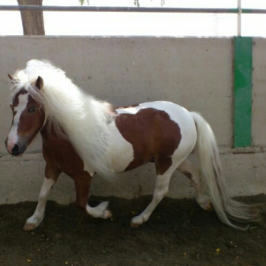 Poni doméstico trotando en un picadero.